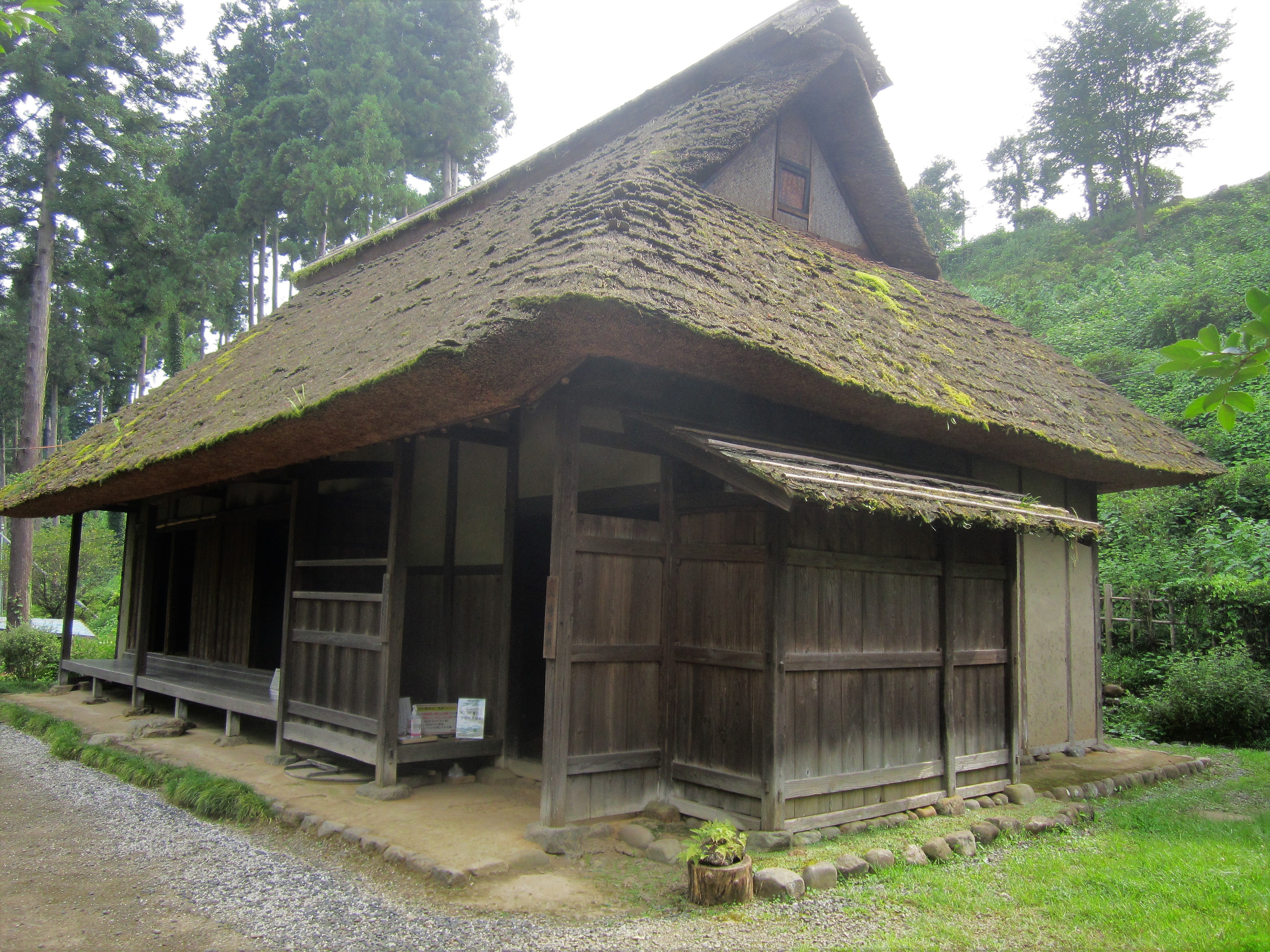 旧宮崎家住宅（青梅市駒木町、青梅市立郷土博物館構内）